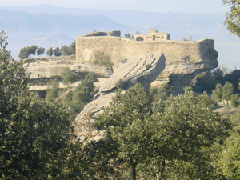 Castell de Taradell